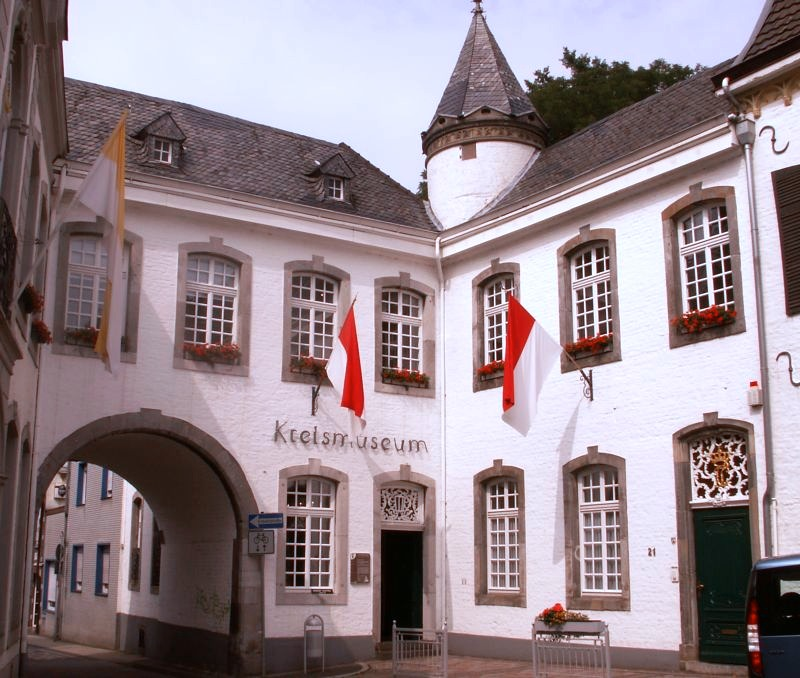 Kreismuseum in Heinsberg